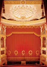 Nationaltheater München Bühnenvorhang